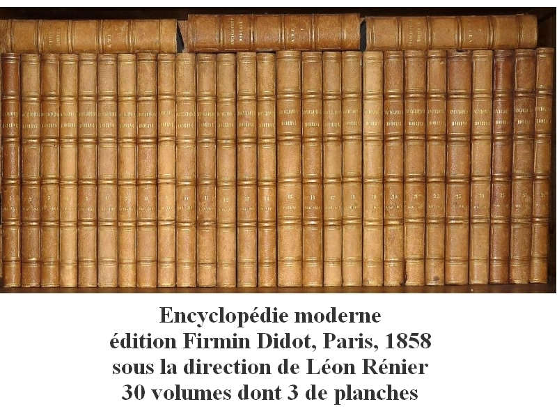 Les 30 volumes de l'Encyclopédie moderne de l'édition Firmin Didot achevée en 1858